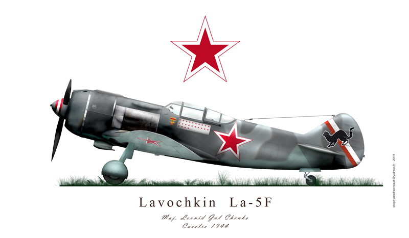 Lavockine La-5F avion de chasse russe seconde guerre mondiale